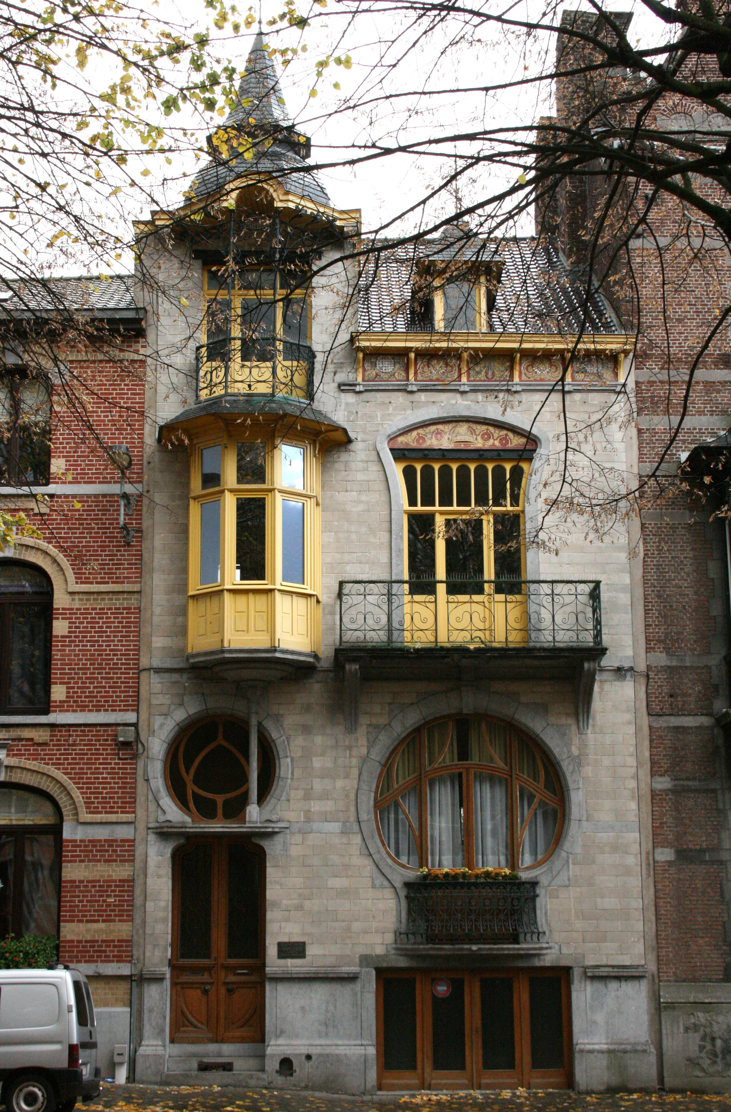 Place Victor Carbonnelle 5, Tournai, Belgique. Immeuble Art Nouveau (1903). Architecte De Porre